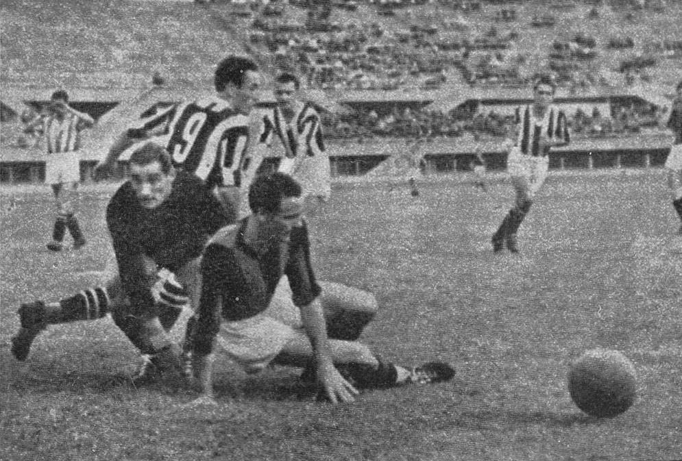 Torino, stadio Municipale Benito Mussolini, 28 giugno 1942. Un'azione di gioco nell'area rossonera, nel corso della sfida tra Juventus e AC Milano (4-1) valevole per la finale di ritorno della Coppa Italia 1941-42; si riconosce il portiere rossonero Giovanni Rossetti (a sinistra).